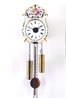 Eine Jockele-Uhr. Die Bezeichnung für, von der Werksgröße (8 cm hoch, 6 cm breit und ca. 5 bis 6 cm tief) her gesehene, kleine Schwarzwälder Uhren. Oft mit Porzellanschild oder Messingblechschild ausgestattet. Der Name geht zurück auf Jacob (Jockele) Herbstreith aus Hinterzarten, der um 1790 diese kleinen Wanduhren fertigte.